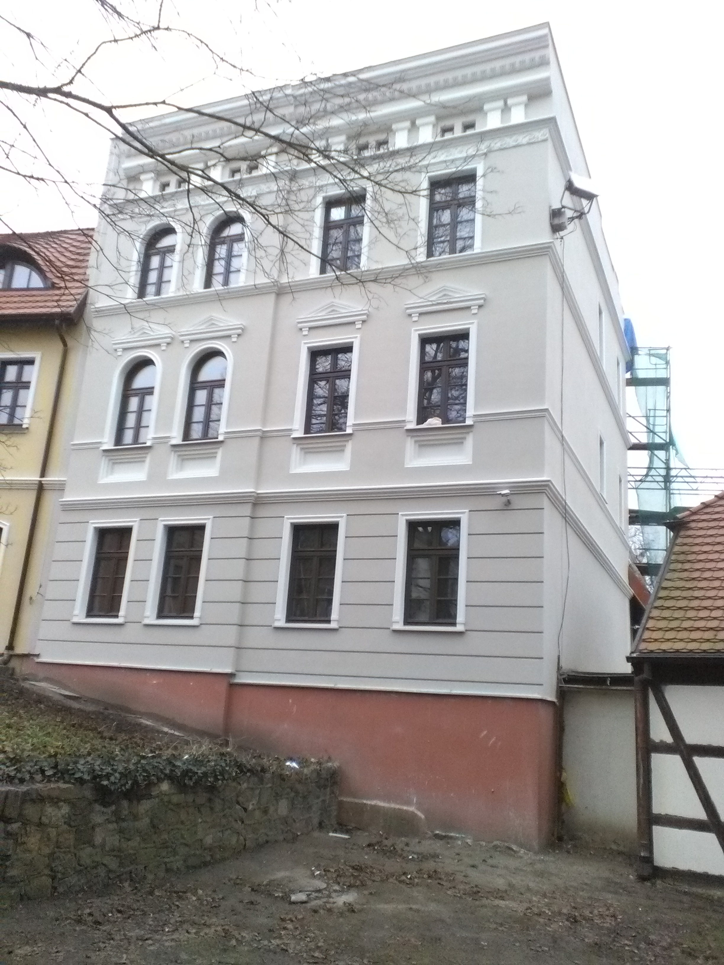 Kamienica na ul. Przyrzecze w Bydgoszczy